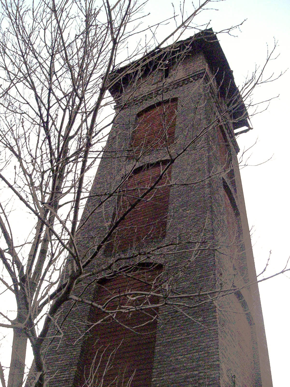 Vodna veza v Petrzalke zblizka fotena